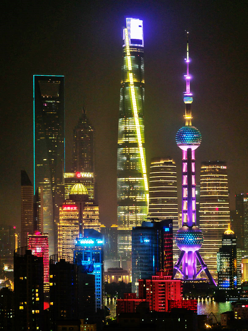 Shanghai